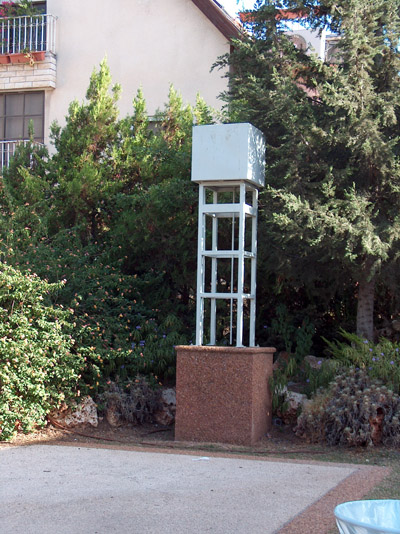 גן המגדל בקריית חיים שהוקם על ידי וועד התושבים, ובו מודל של מגדל המים ששכן במקום.